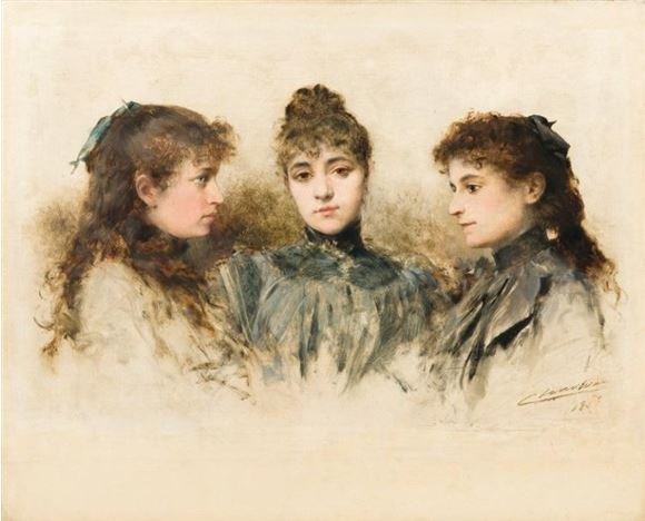 Portrait de femmes par Alexandre-Jacques Chantron (1942-1918), huile, 38 x 46cm